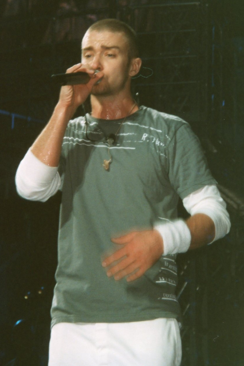 El cantante estadounidense Justin Timberlake dando un show en el Earls Court Exhibition Centre de Londres, Inglaterra, con motivo de su gira musical Justified World Tour en 2003-2004.